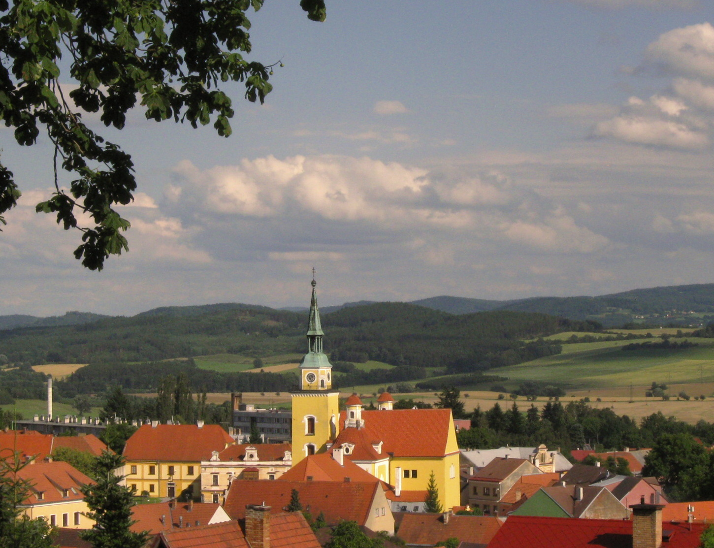 Kostel Zvěstování P. Marie (Vlachovo Březí), Vlachovo Březí